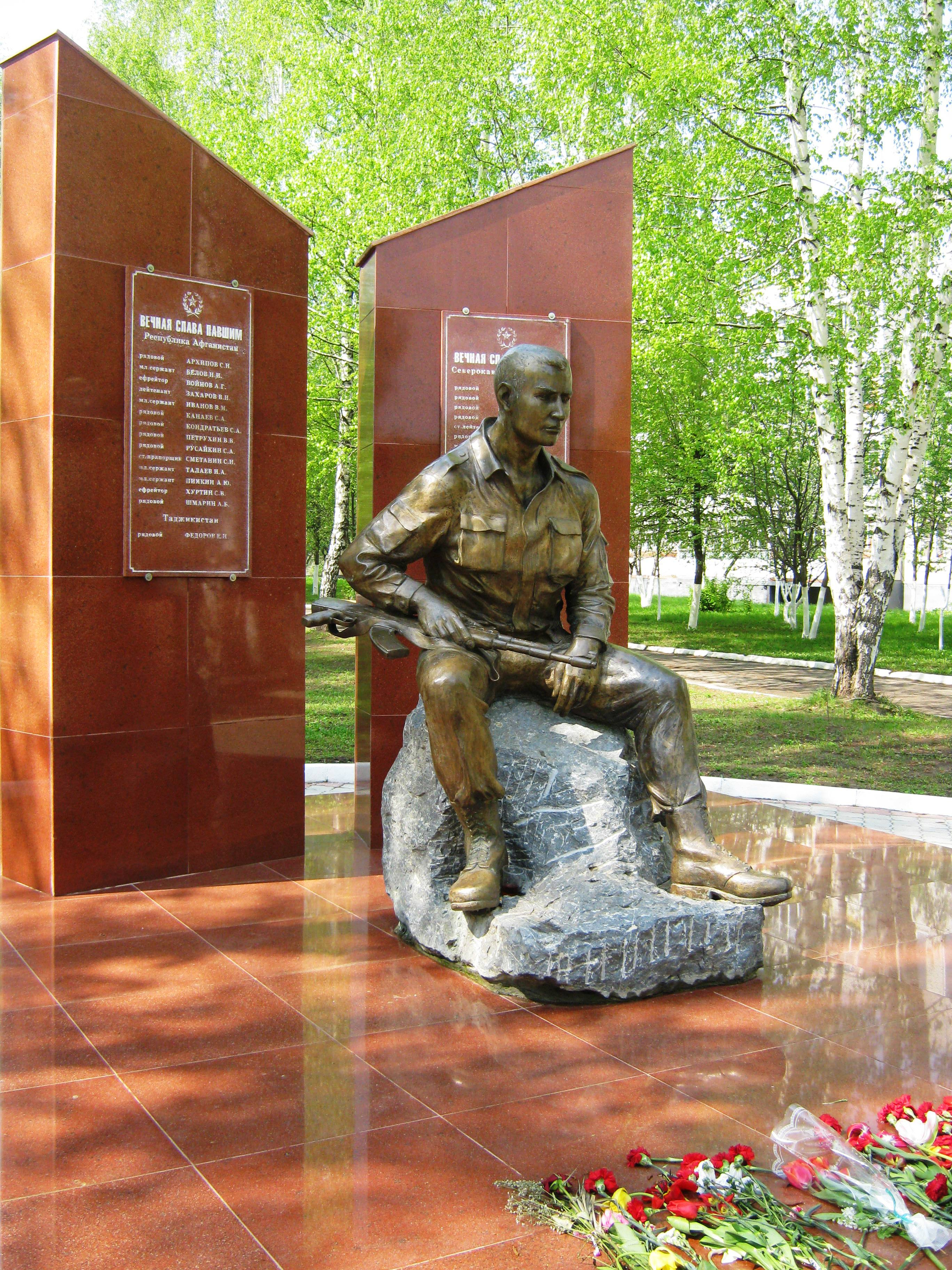 Памятник погибшим в локальных конфликтах в Новочебоксарске